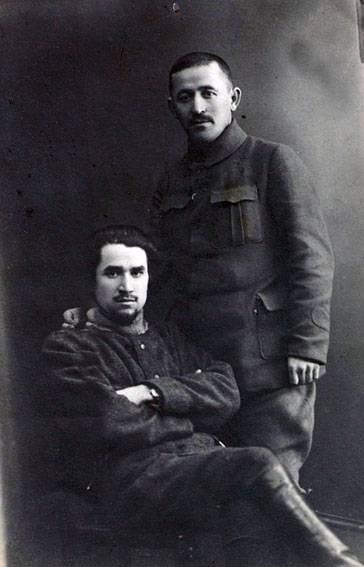 М.Х. Султан-Галиев (слева) с членом Казанского губкома РКП (б) И.К. Фирдевсом (справа)